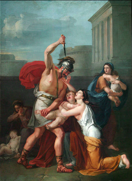 Дурнов Т. Ф. - Избиение младенцев (1909)